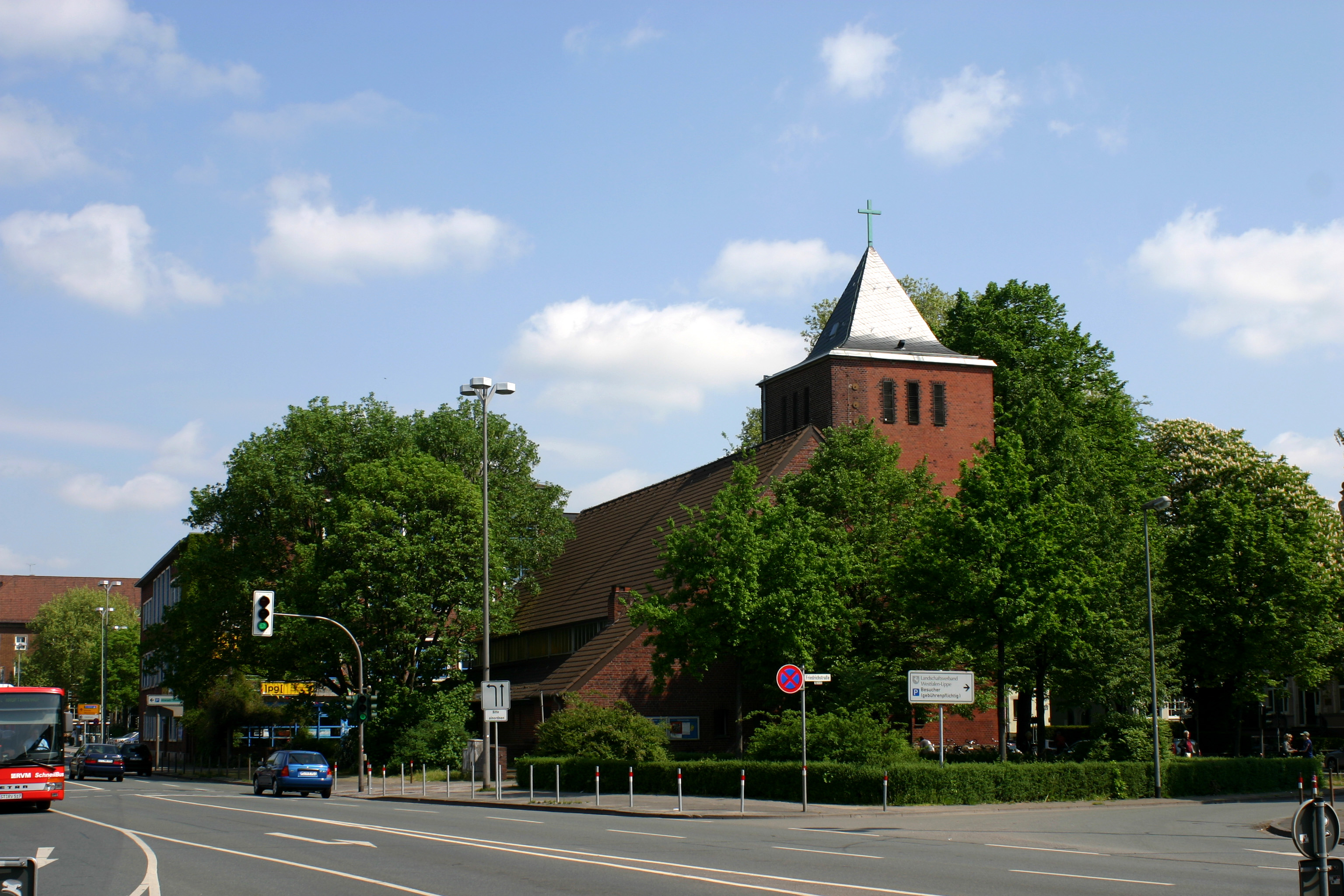 Erlöser-Kirche, 1949-1950 mit Hilfe des Lutherischen Weltbundes eine von 50 Notkirchen des Architekten Otto Bartning errichtet.